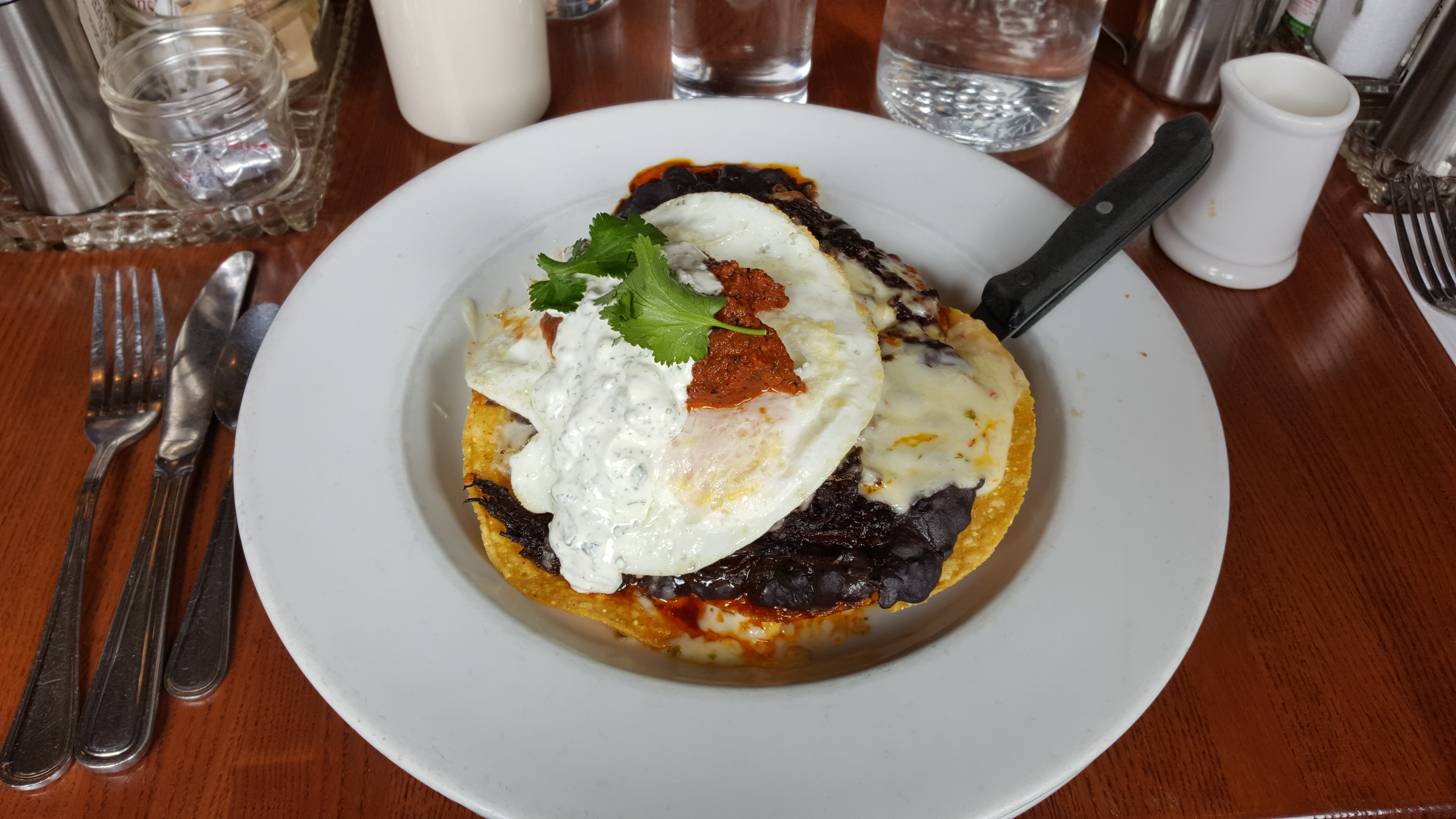 Huevos rancheros at Screen Door